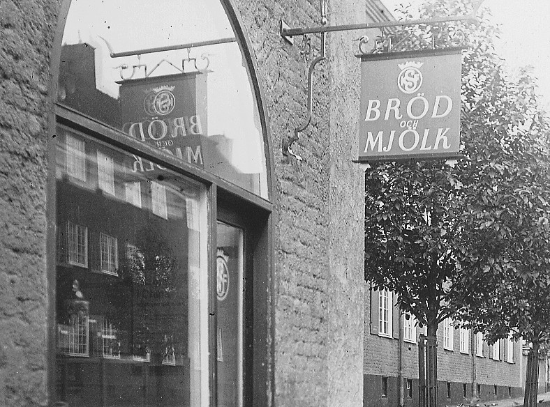 Bröd och mjölk i kvarteret Motorn, Upplandsgatan 93